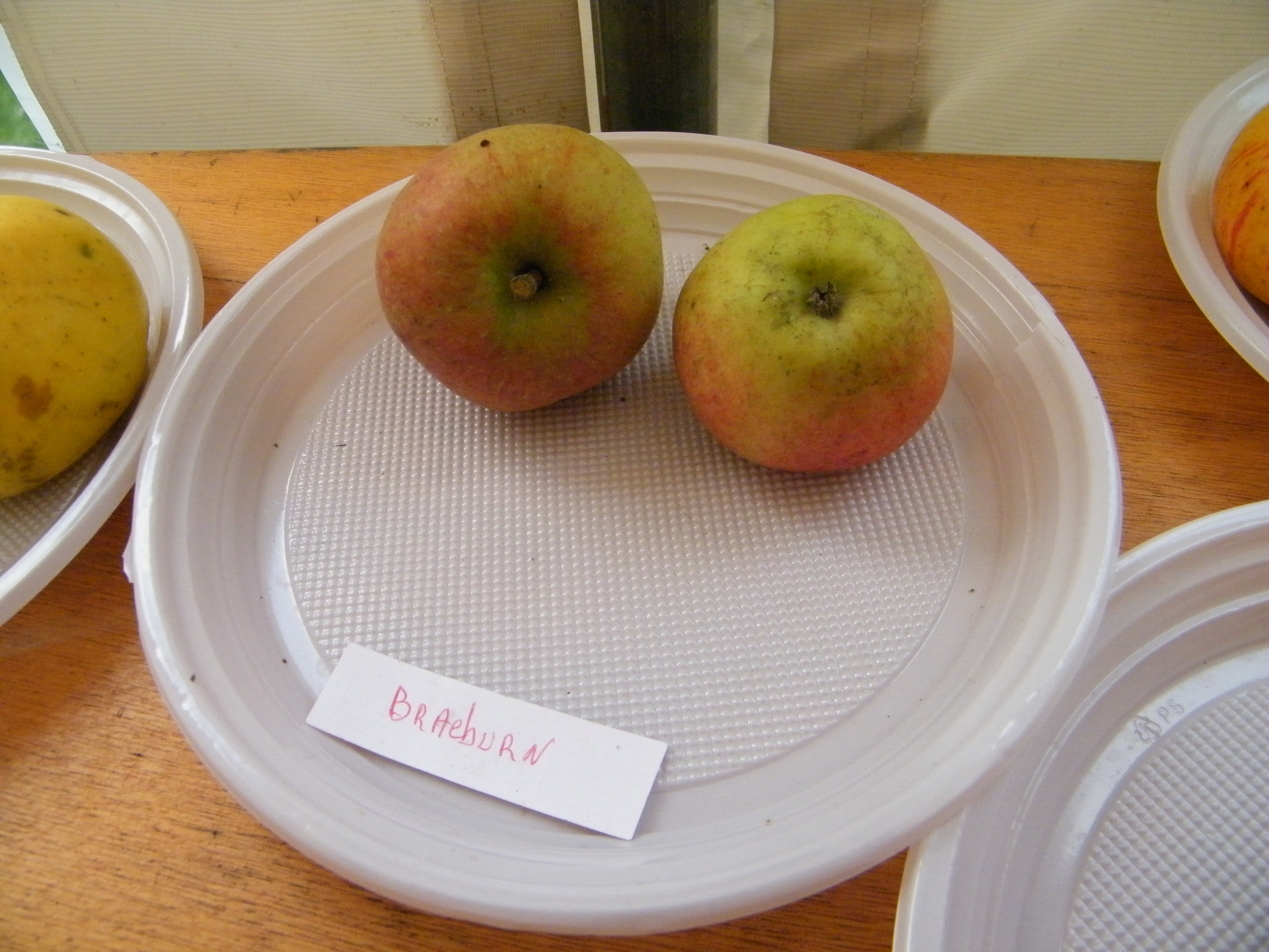 Braeburn (apple), Mons-Boubert, Somme, Fr, expo du 29-10-2017 (49)